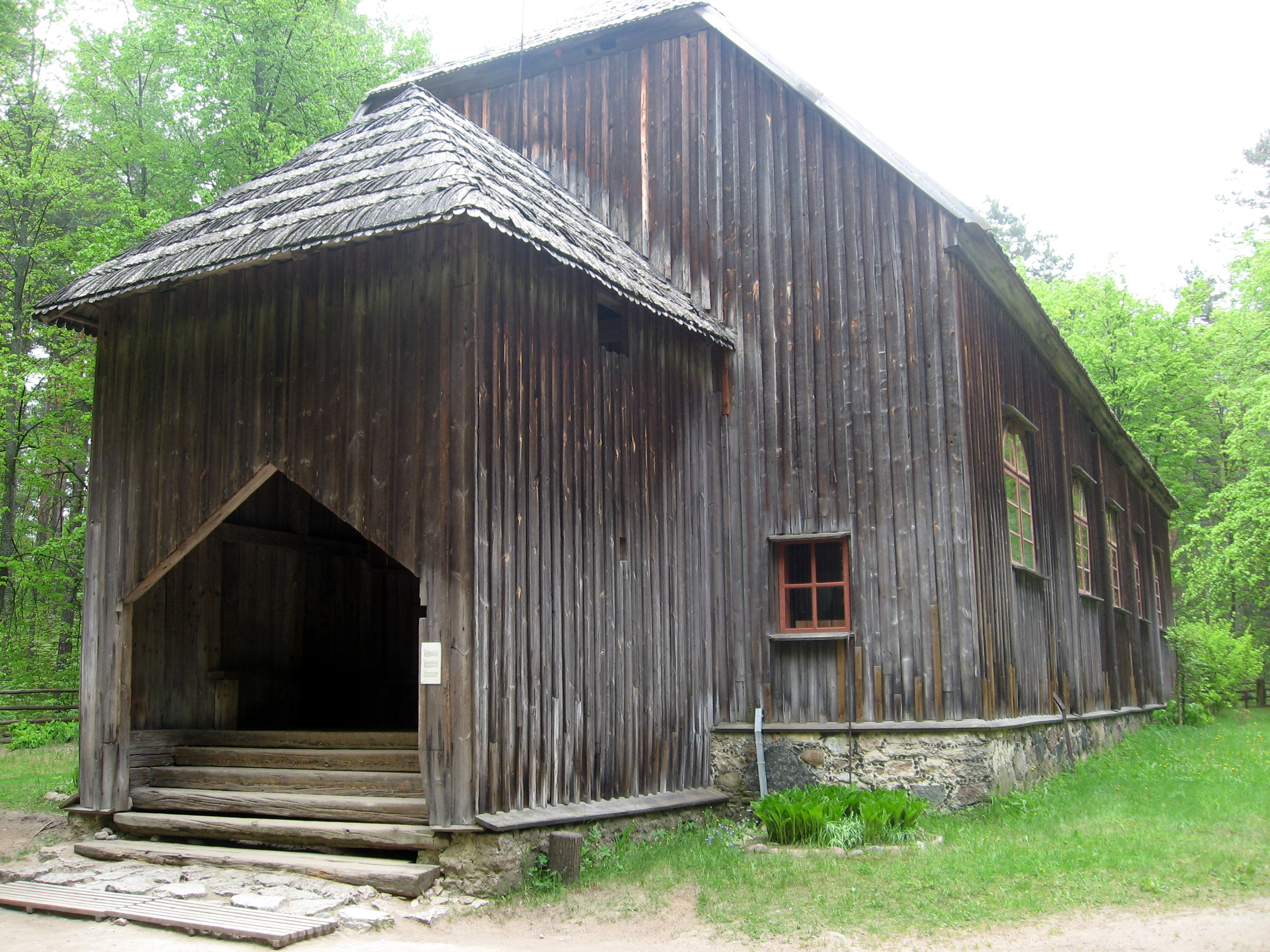 Lotyšské etnografické muzeum v přírodě: Luteránský kostel, oblast Kurzeme, Renda, Usma, postaven 1704